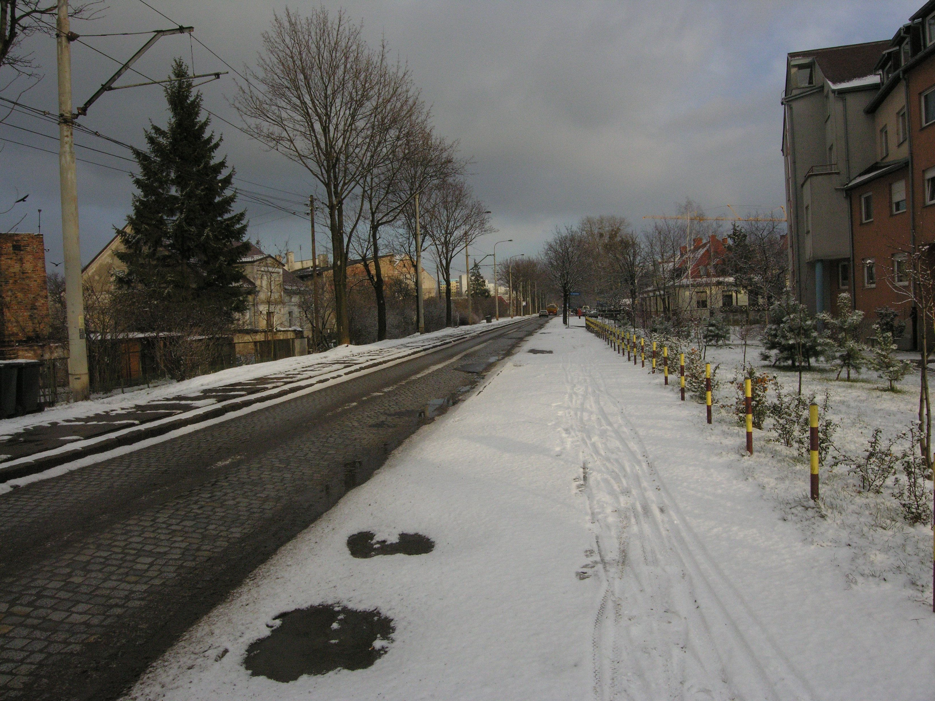 Partynice, Wrocław